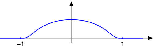 fonction mollifiante, C_infini à support compact